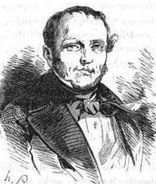 Giuseppe Fieschi (1790-1836).